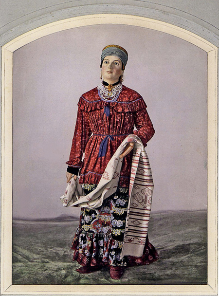 Замужняя крестьянка Бирюченского уезда 1870-е. В 1867 году в Москве состоялась знаменитая Этнографическая выставка. На выставке демонстрировались "фигуры"-манекены в костюмах народов Российской империи.Манекены изготавливались профессиональными художниками-скульпторами,а некоторые фигуры создавались прямо с натуры. После окончания выставки демонстрировавшиеся на ней манекены были специально сфотографированы в мастерской венского фоторгафа Т. Митрейтера, сотрудничавшего с Московским Публичным и Румянцевским музеями.Фотографии сделанные на солёной бумаге,были раскрашены акварелью и помещены в паспарту.Вся эта редкая коллекция фотографий хранится в Российском Этнографическом музее Санкт-Петербурга.